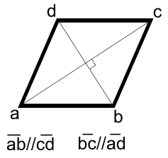 Rombo